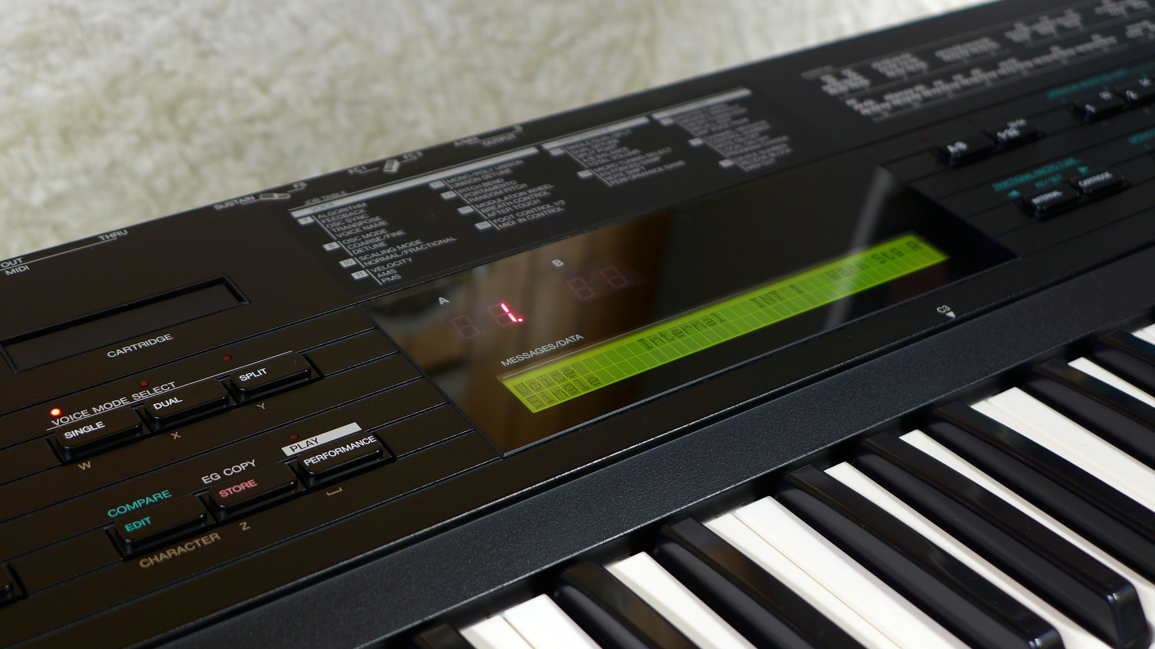 Display